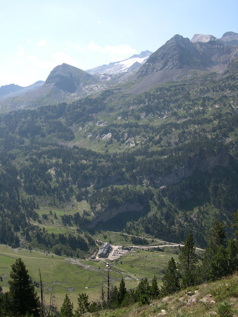 Con el Aneto y su glaciar al fondo. Parque Natural de Posets-Maladeta. Valle de Benasque (Huesca).